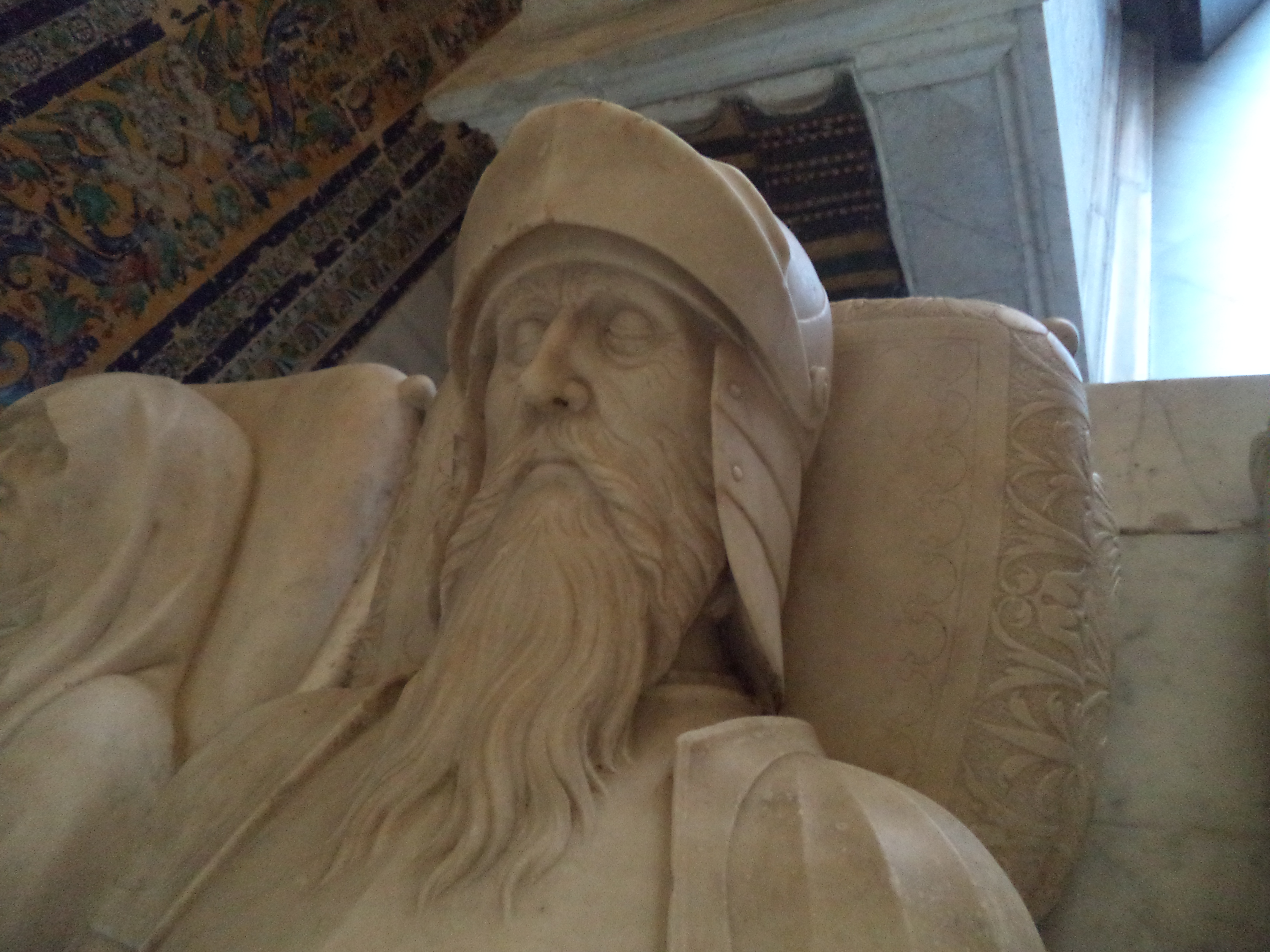 Sepulcro de Per Afán de Ribera el Viejo en el monasterio de Santa María de las Cuevas, provincia de Sevilla (España).